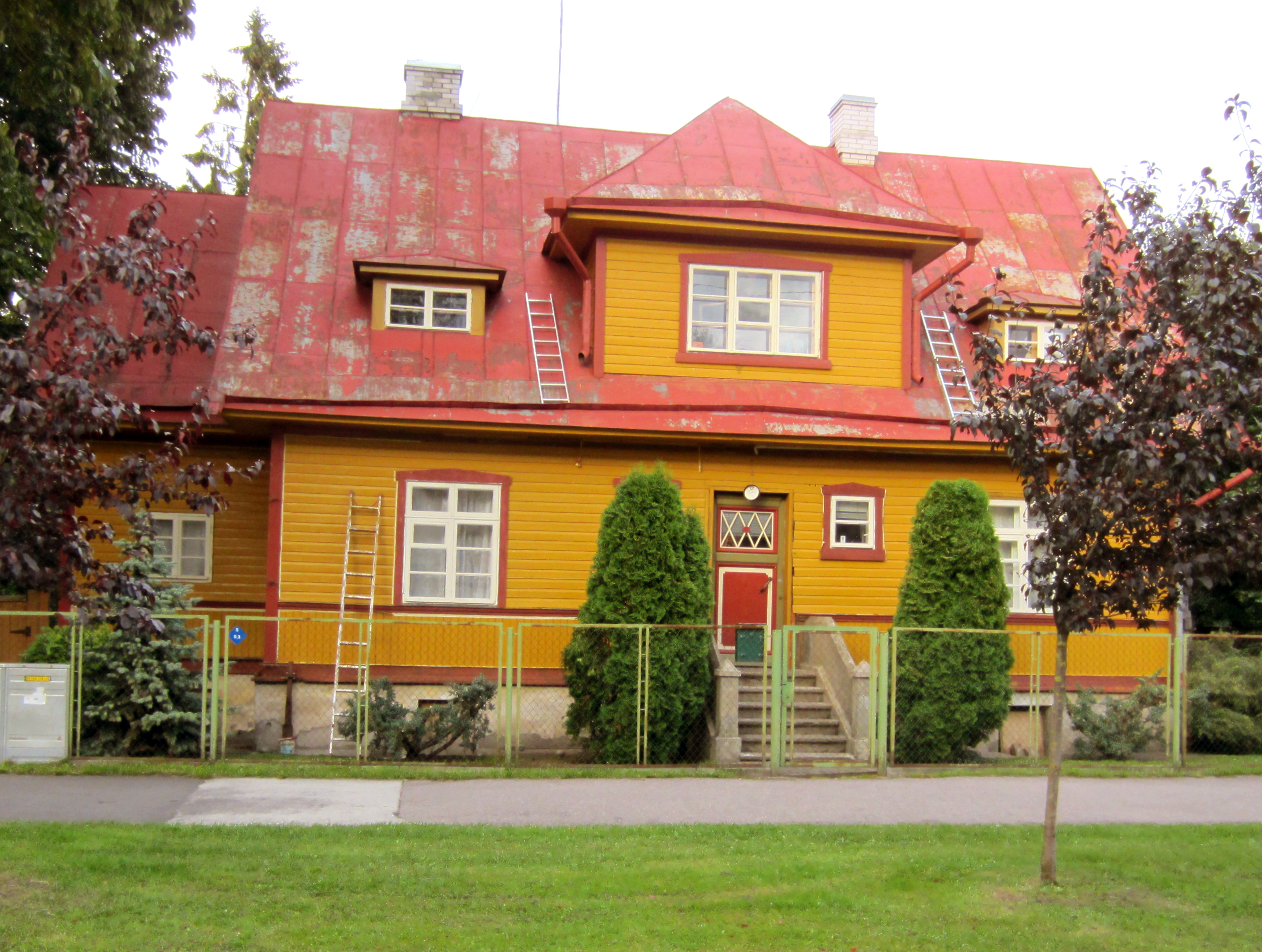 Elamu Koidu tn 73, 1925. a.